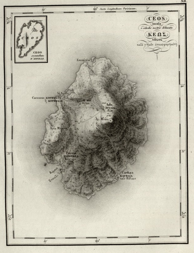 Map of Kea island/Carte ancienne de l'île de Kéa